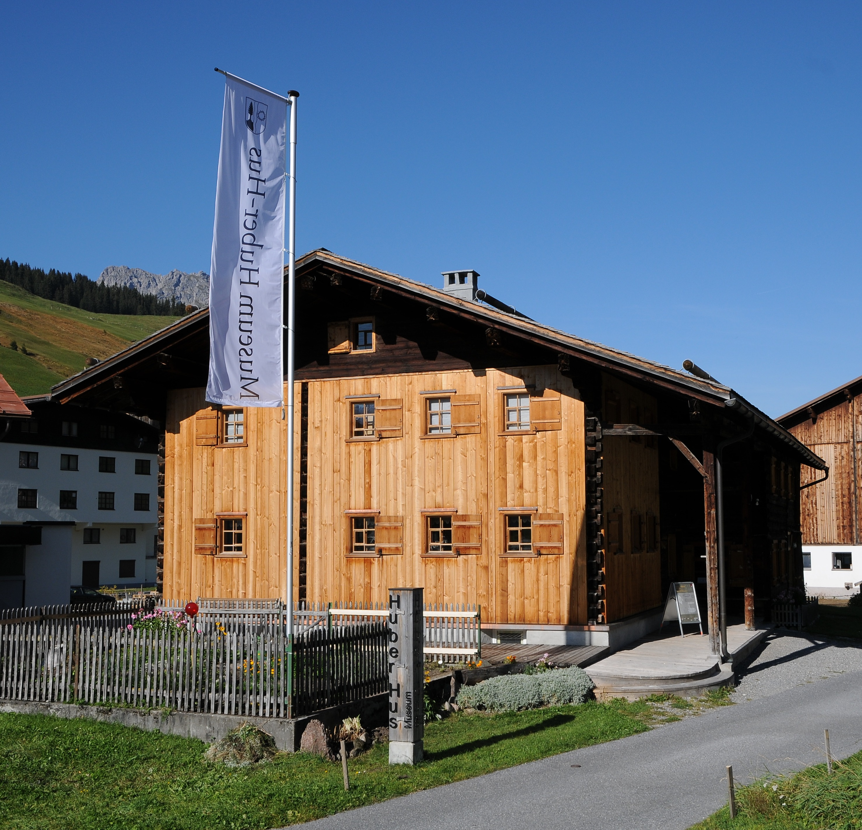 Bauernhaus, Heimatmuseum, Huber-Haus im Dorf Nr.26 in Lech (Vorarlberg).